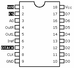 patillaje del Philips SAA 1099